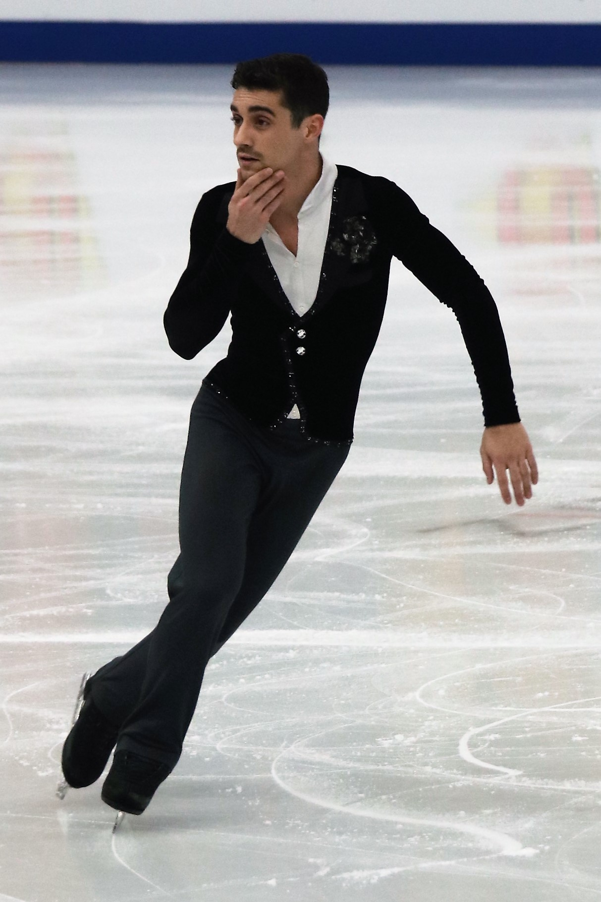 Хавьер Фернандес (Испания) на Чемпионате Европы по фигурному катанию 2018.